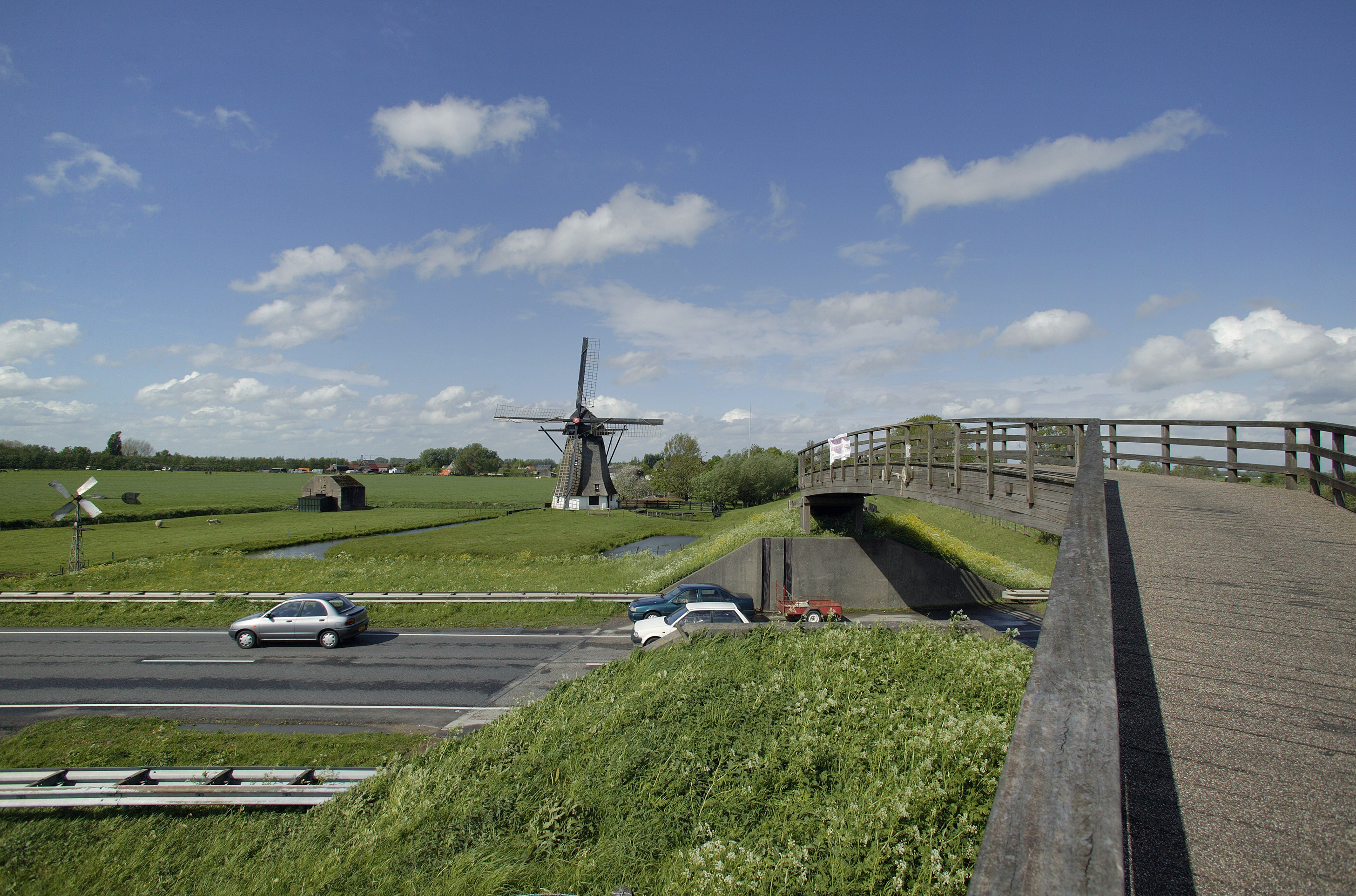 Cultuurlandschap: Schenkeldijk bij Werkendam